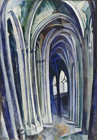 Robert Delaunay: Saint-Séverin No. 1. Öl auf Leinwand, 117 x 83 cm, Privatbesitz